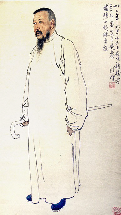 徐悲鸿作品《李印泉先生像》